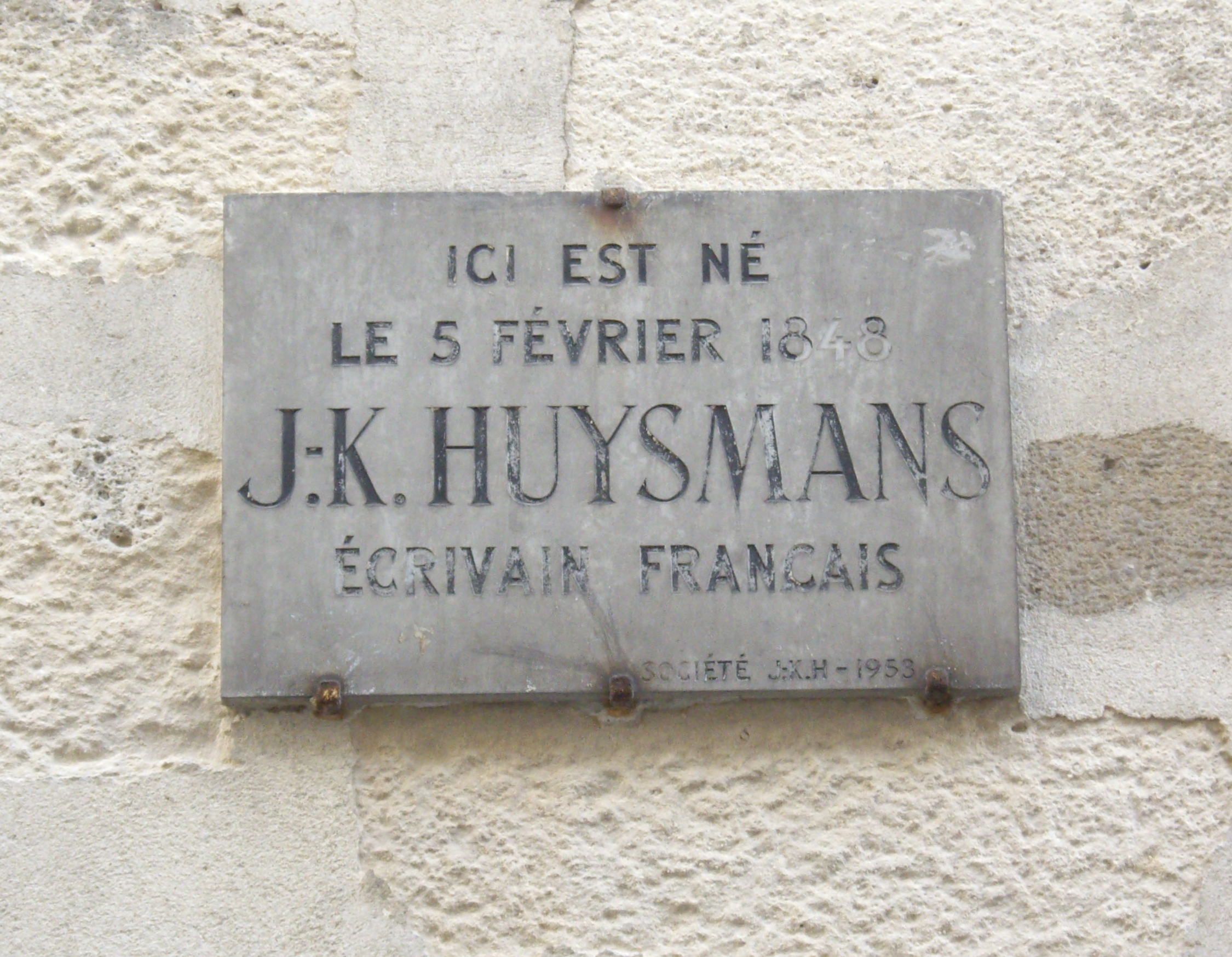 Plaque apposée au n° 9 de la rue Suger, Paris 6e, où naquit l'écrivain Joris-Karl Huysmans (1848-1907) le 5 février 1848.